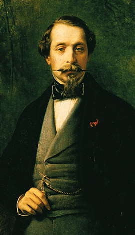 Napoleon III av Frankrike målad av Franz Xaver Winterhalter, 1857 Kategori:Målningar